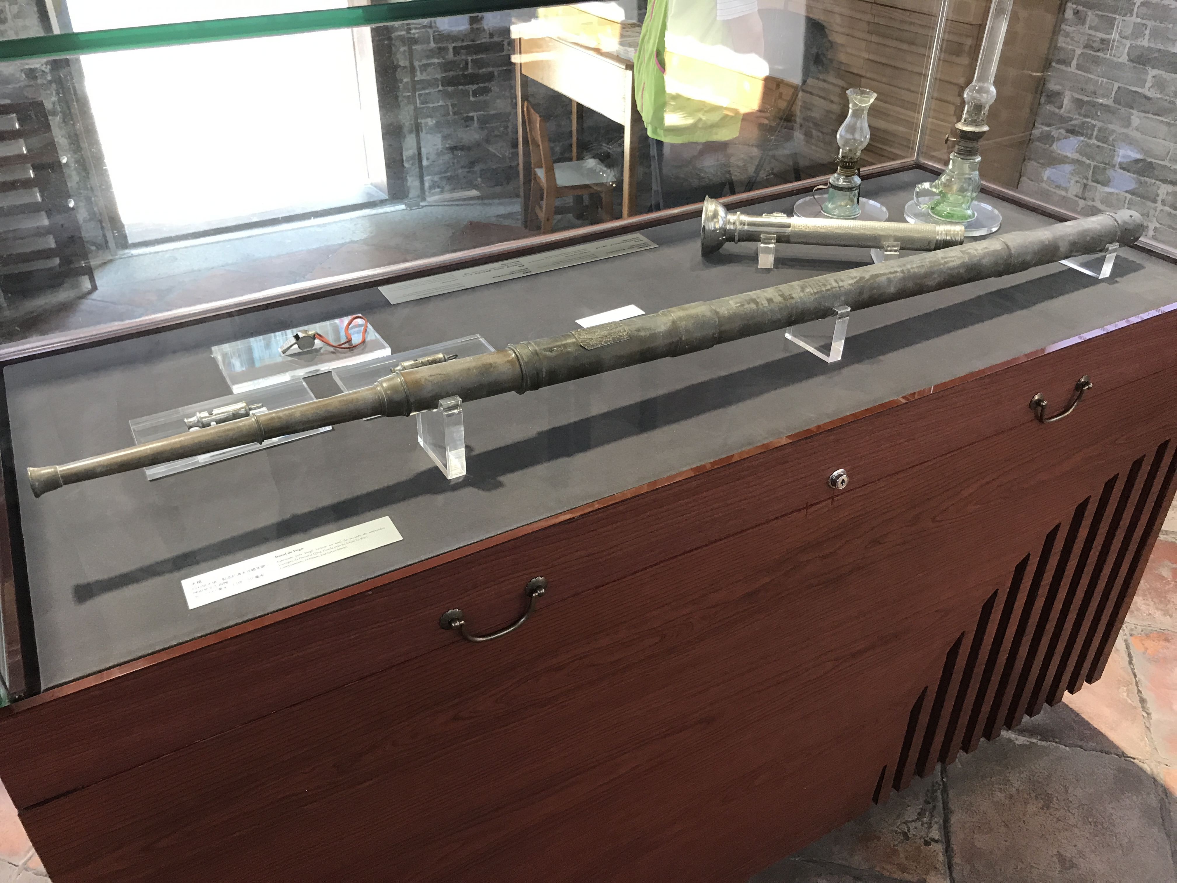 中文（台灣）: 更館內與打更相關的物品。